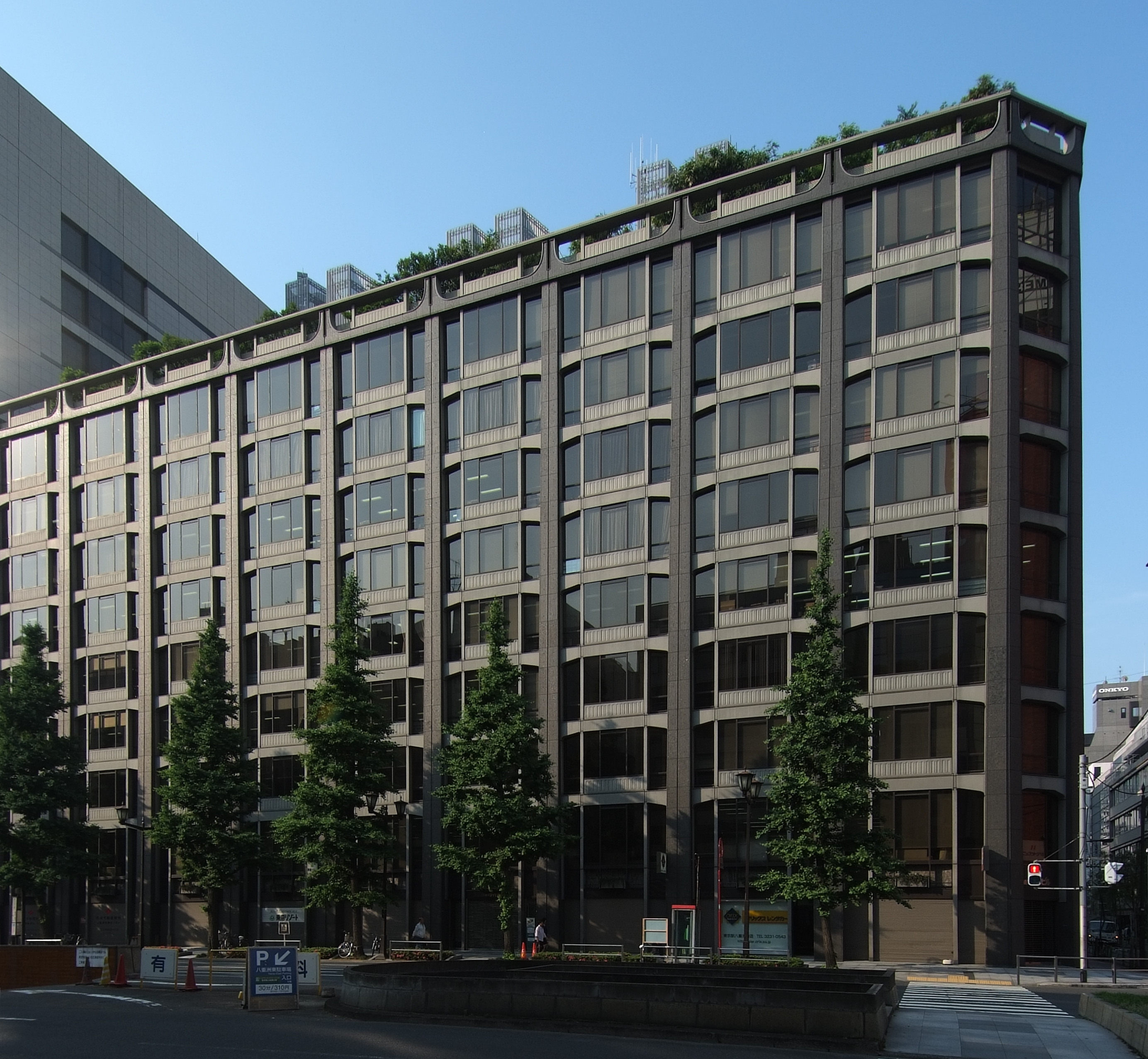 Yaesu Daibiru, at Chuo-ku Tokyo Japan, design by Togo Murano in 1965.